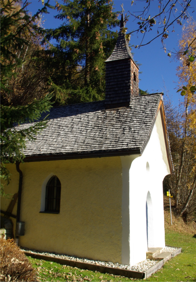 Waldkapelle